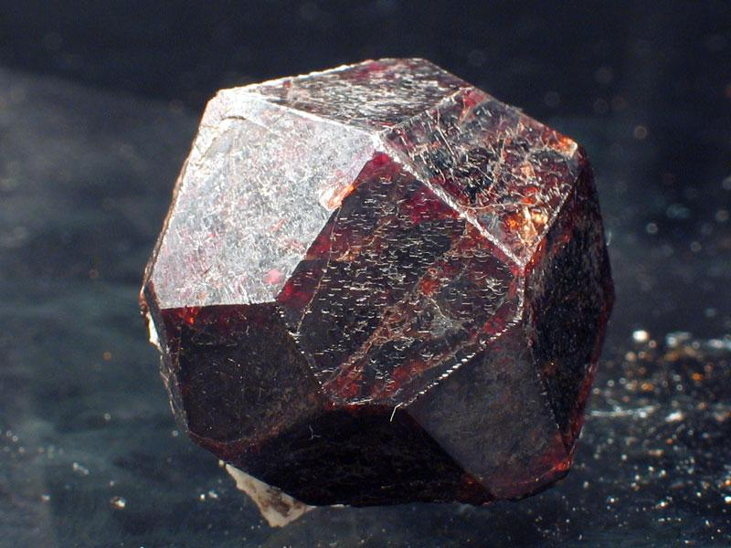 granat, pochodzenie Madagaskar, autor zdjęcia Stowarzyszenie Spirifer